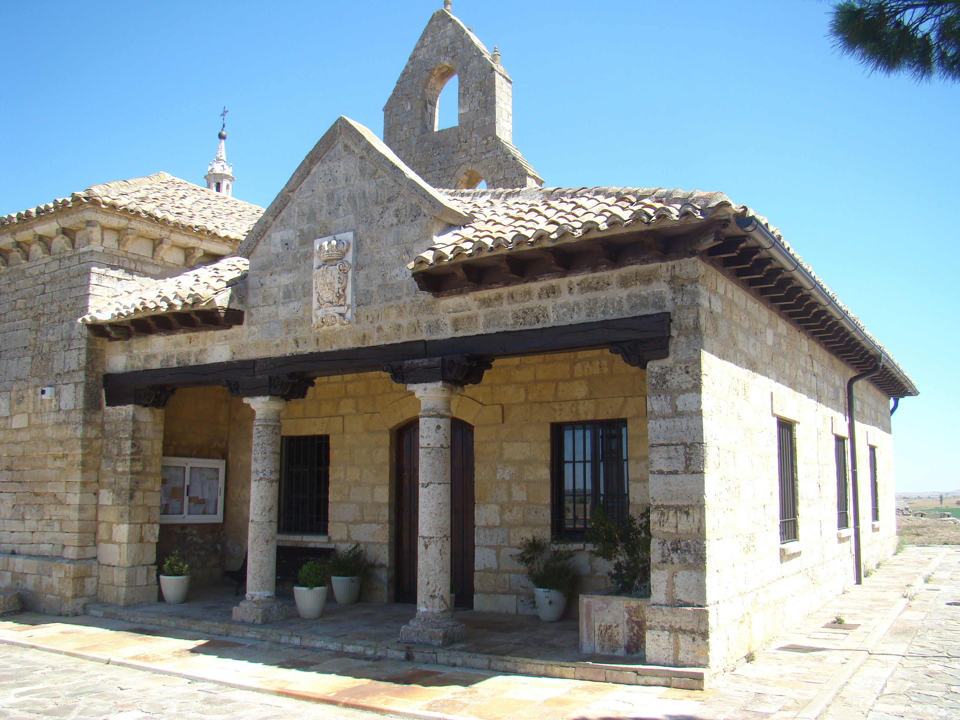 Támara de Campos (Palencia, España). Sede del Ayuntamiento en el edificio románico que fue la iglesia de la Orden de San Juan de Jerusalén.